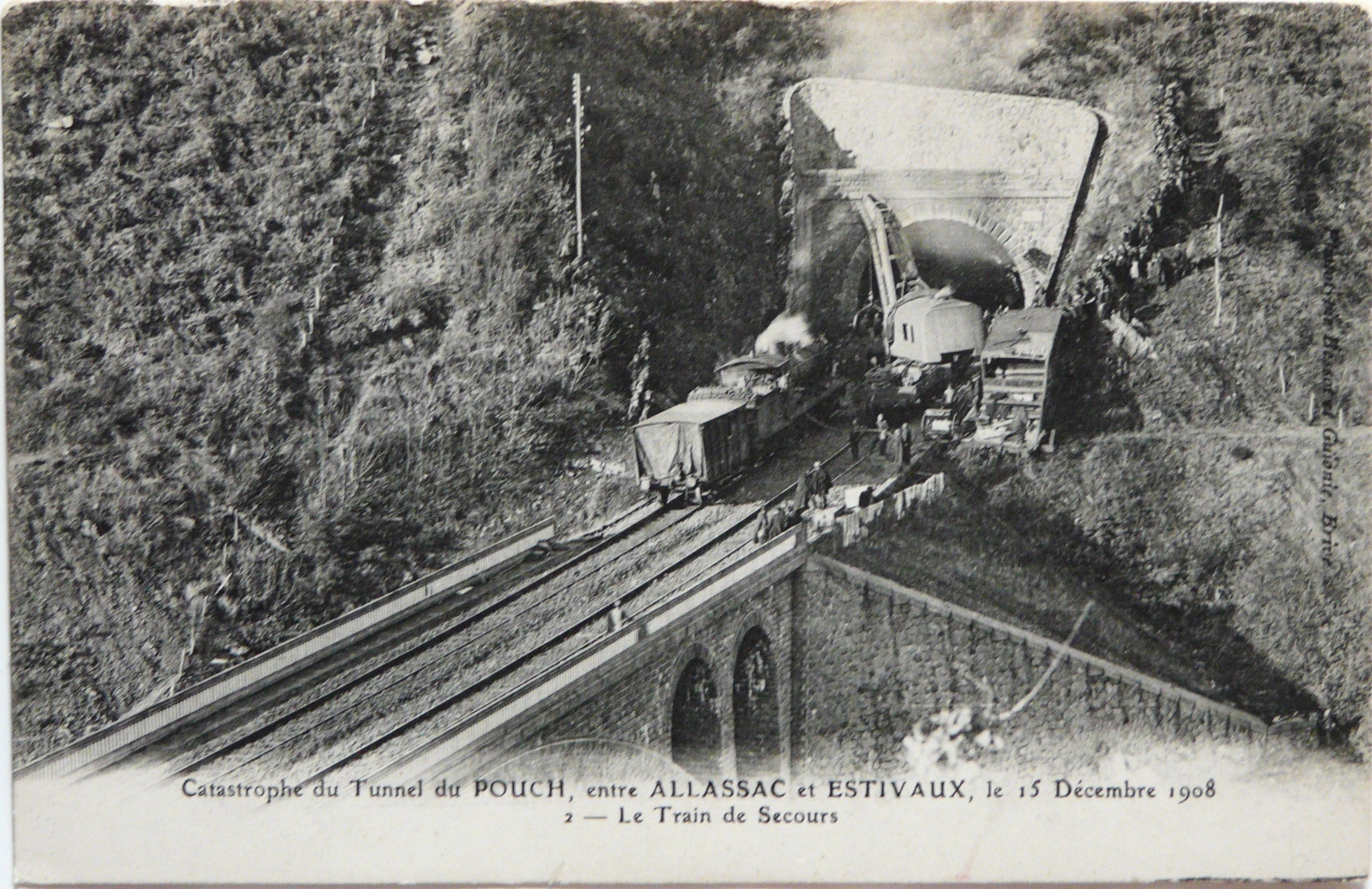 Catastrophe du tunnel de Pouch du 15 décembre 1908 (le train de secours).